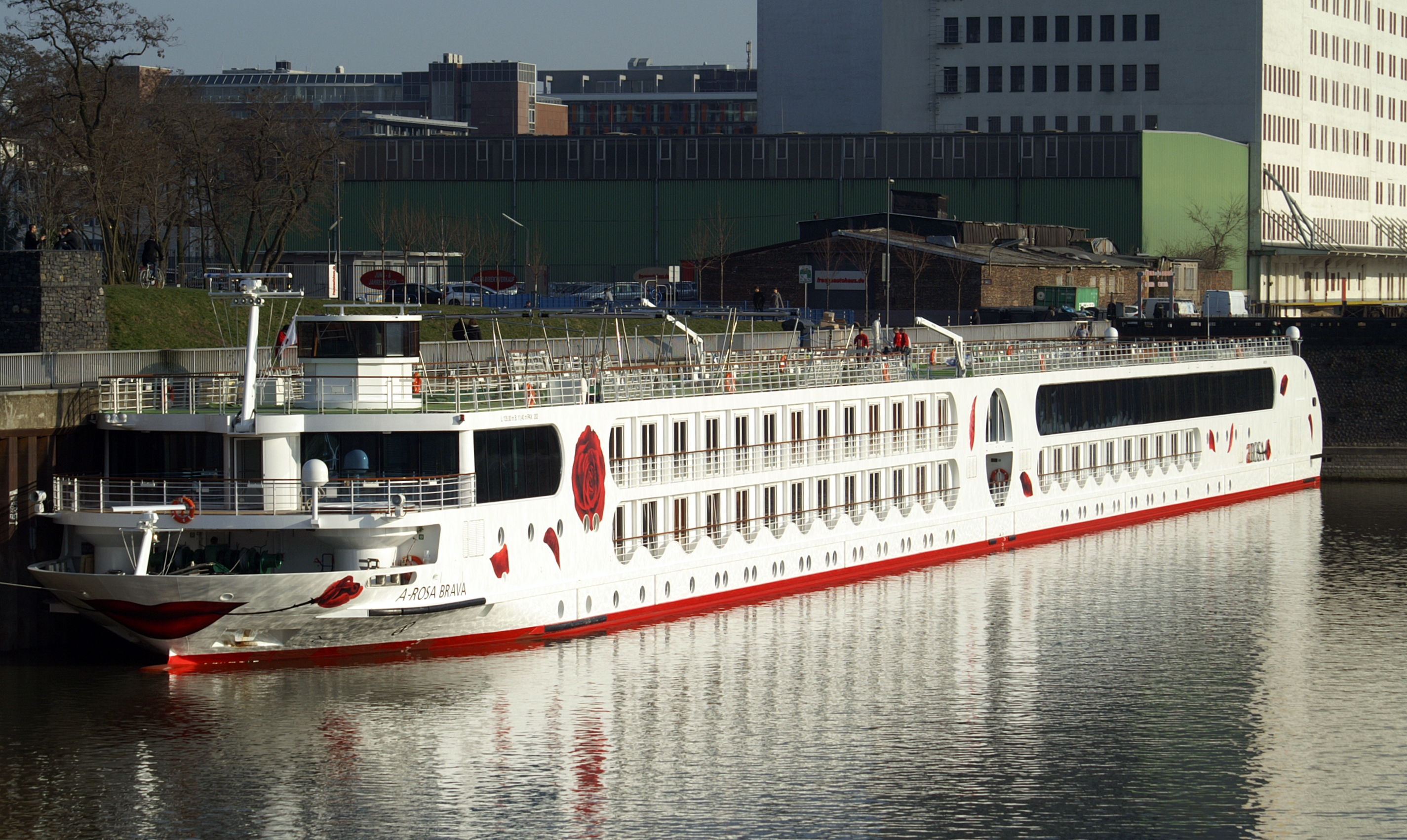 Das neu gebaute Flusskreuzfahrtschiff A'Rosa Brava während der letzten Ausrüstungsarbeiten im Deutzer Hafen in Köln. Nach Abschluss der Arbeiten wird das Schiff nach Frankfurt am Main überführt, wo es am 1. April 2011 getauft werden soll.